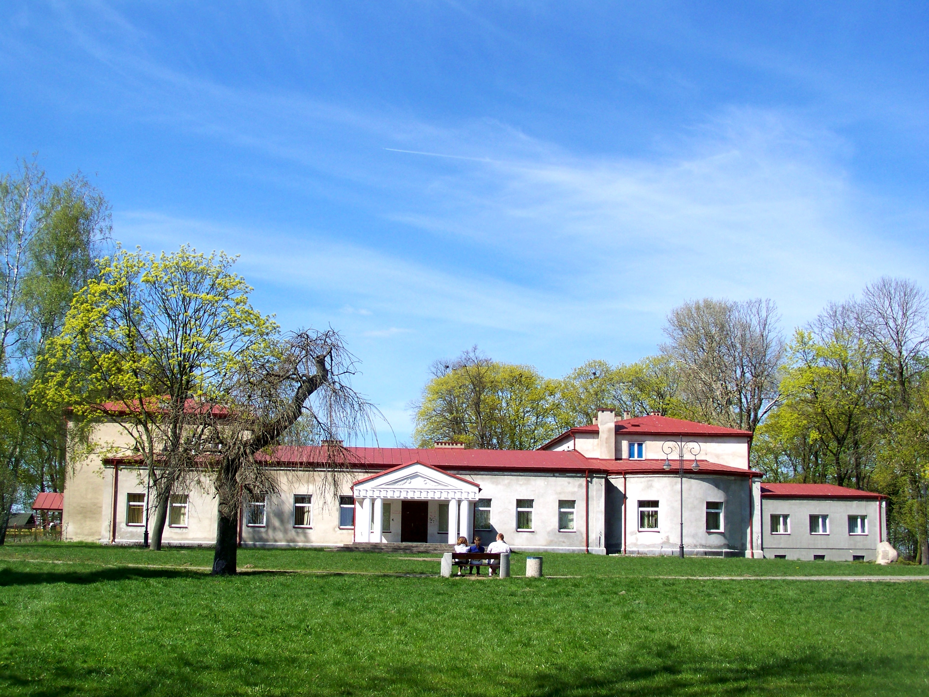 Dom Miłosierdzia Bożego im. Jana Pawła II w Sokołowie Podlaskim